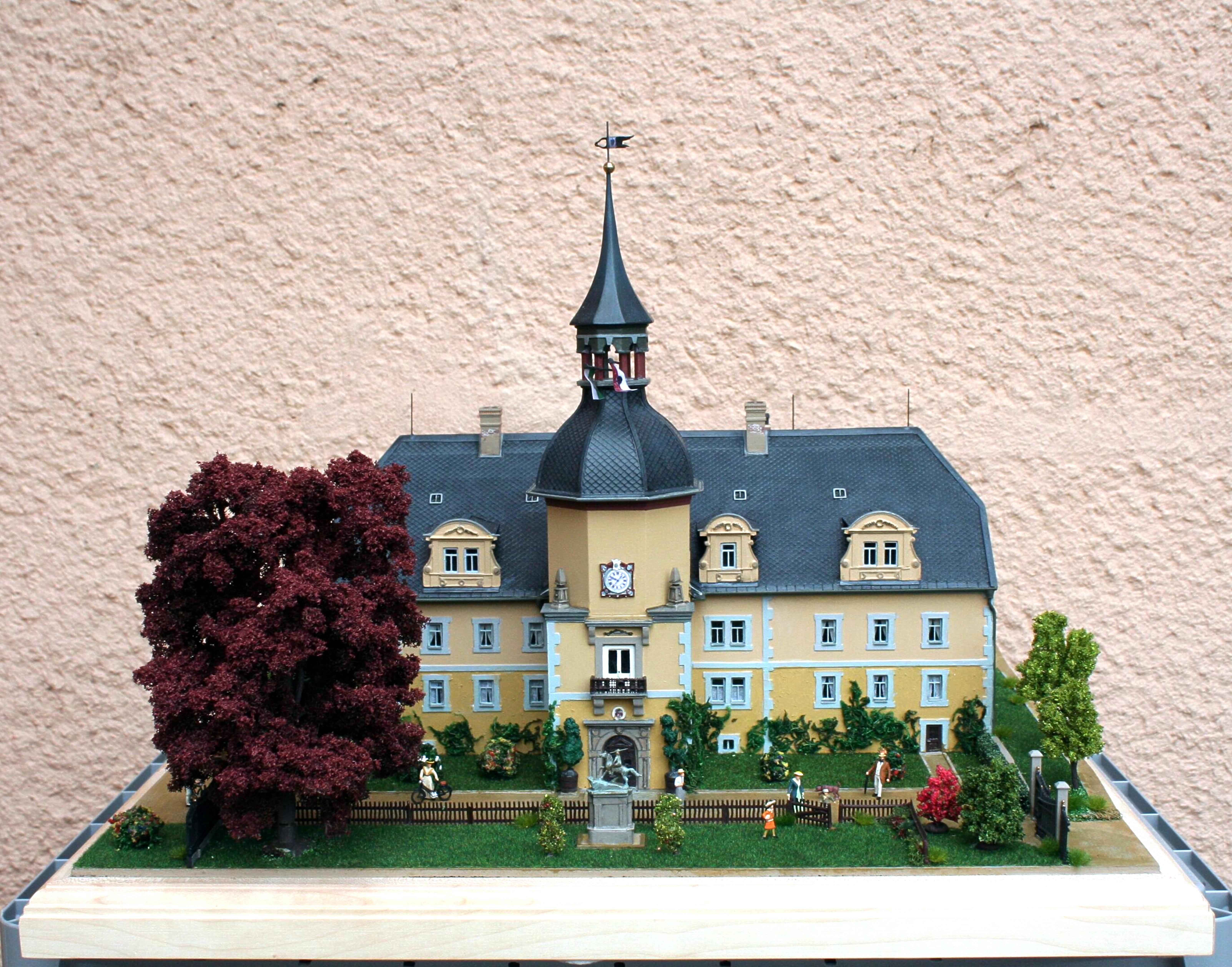 Schloss Naundorf bei Schmiedeberg-Schlossmodell im Maßstab 1:87, Vorderansicht um 1900 vom Hobby-Modellbauer Rainer Dierchen.